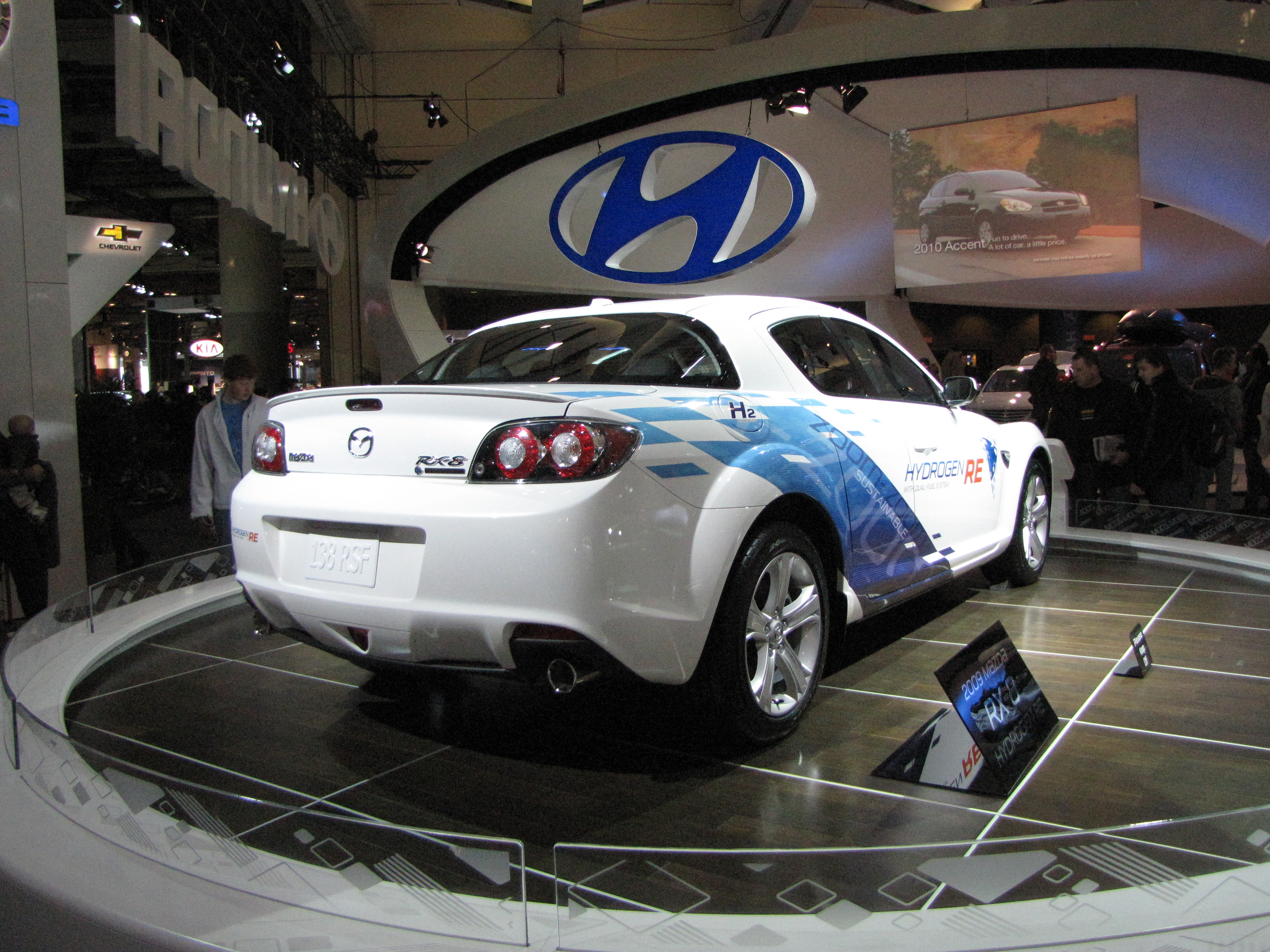 2009 Mazda RX-8 Hydrogen RE